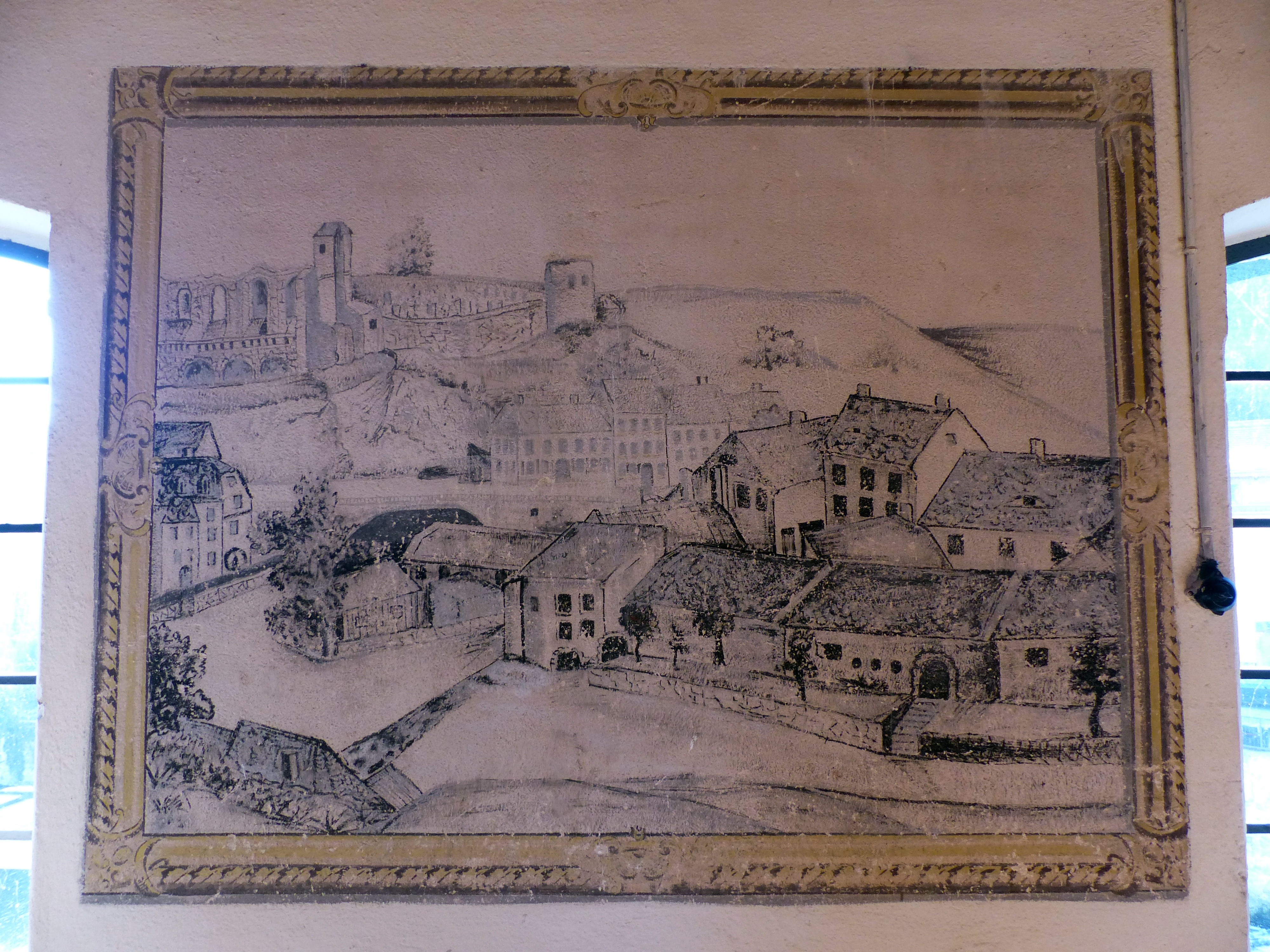 Hammermühle-Eisenhammer, Seidauer Straße 2; 4, Bautzen